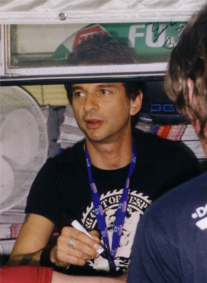 Dave Gahan im Bus des MusikExpress Autogramme schreibend (Rock am Ring 2003)